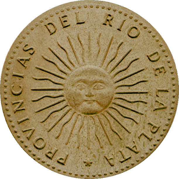 Sol de Mayo aparecido en la primera moneda argentina.